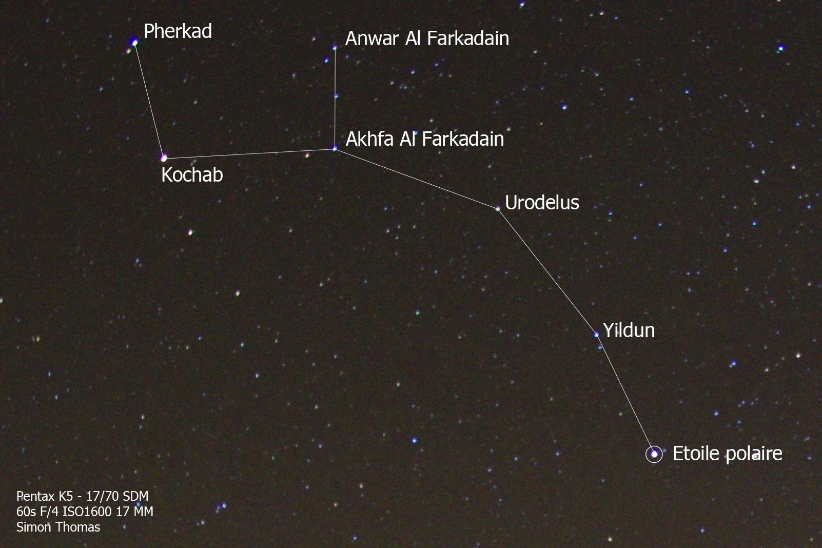 Vue de la petite ourse et de ses étoiles